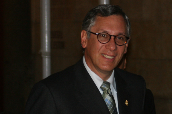 O presidente constitucional do Estado Plurinacional da Bolívia, Eduardo Rodríguez Veltzé